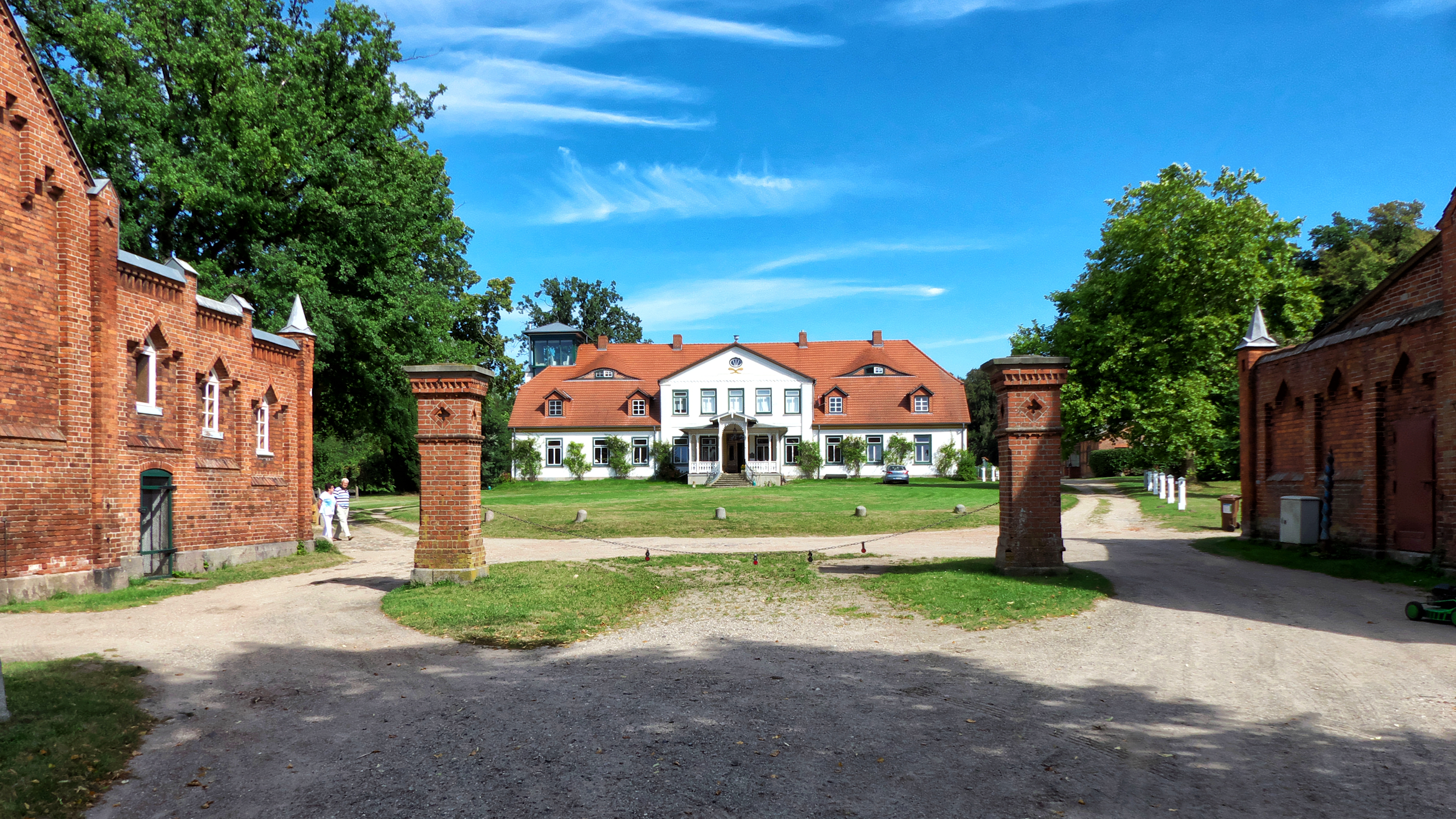 Herrenhaus und Nebengebäude integrieren sich hervorragend in die abgeschiedene Landschaft am Schaalsee im Kreis Lauenburg.